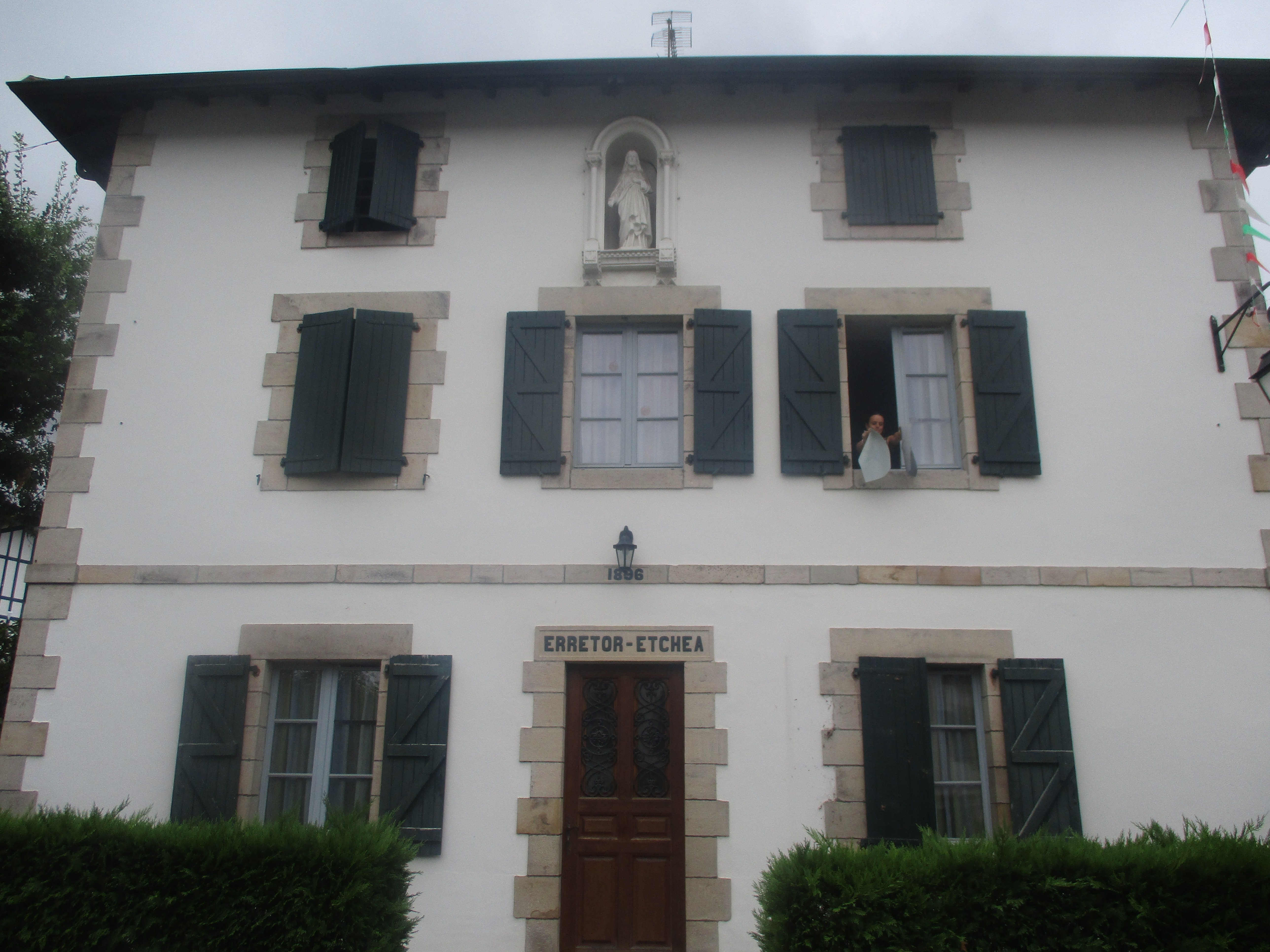 Erretor etchea (Maison du recteur). Ancien presbytère d'Ascain en face de l'église sur la place du village.